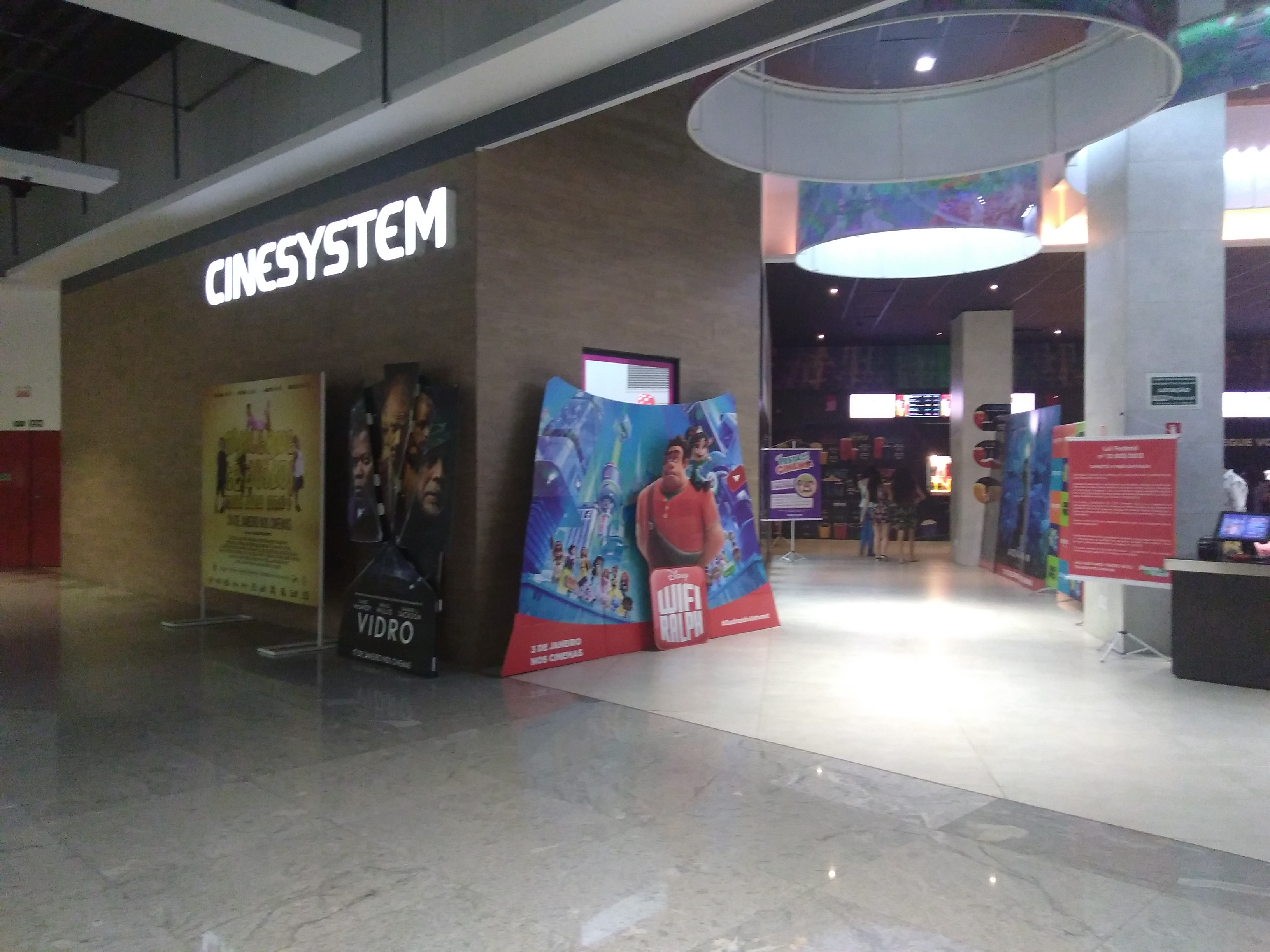 Área externa e interior do cinema Cinesystem Shopping Metropole Ananindeua, instalado no Shopping Metrópole da cidade de Ananindeua, Pará.